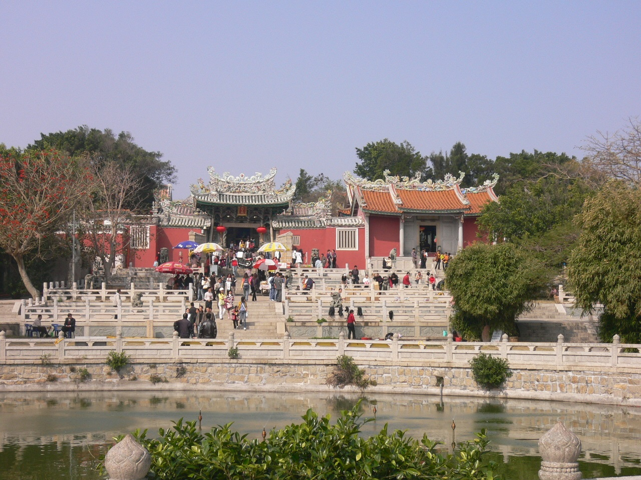 关帝庙 Guān dì miào of Dongshan, Zhangzhou, Fujian.